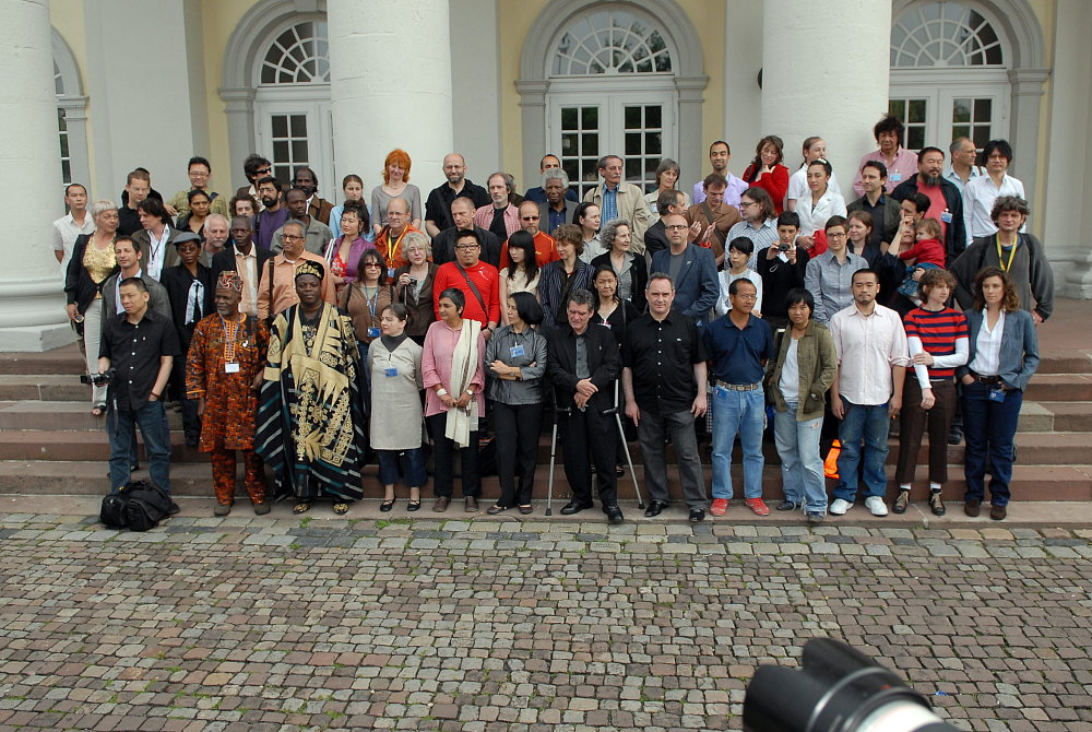 Gruppenfoto der documenta 12 Künstler